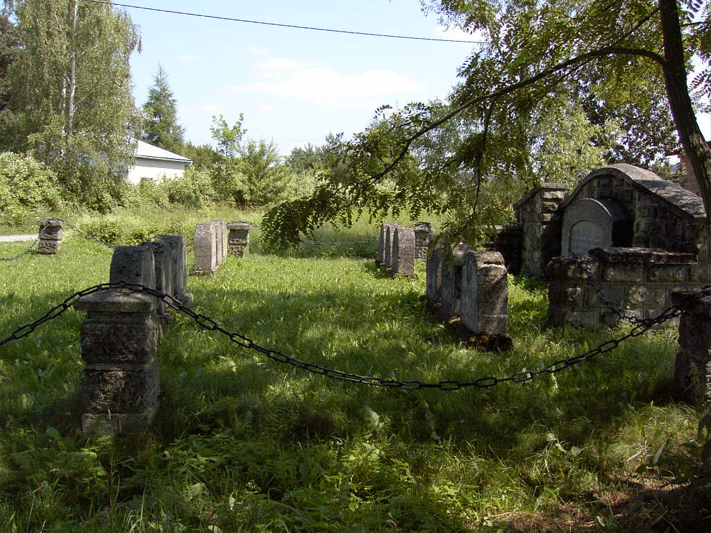 Cmentarz nr 293 w Zakliczynie - pochowani żołnierze pochodzenia żydowskiego